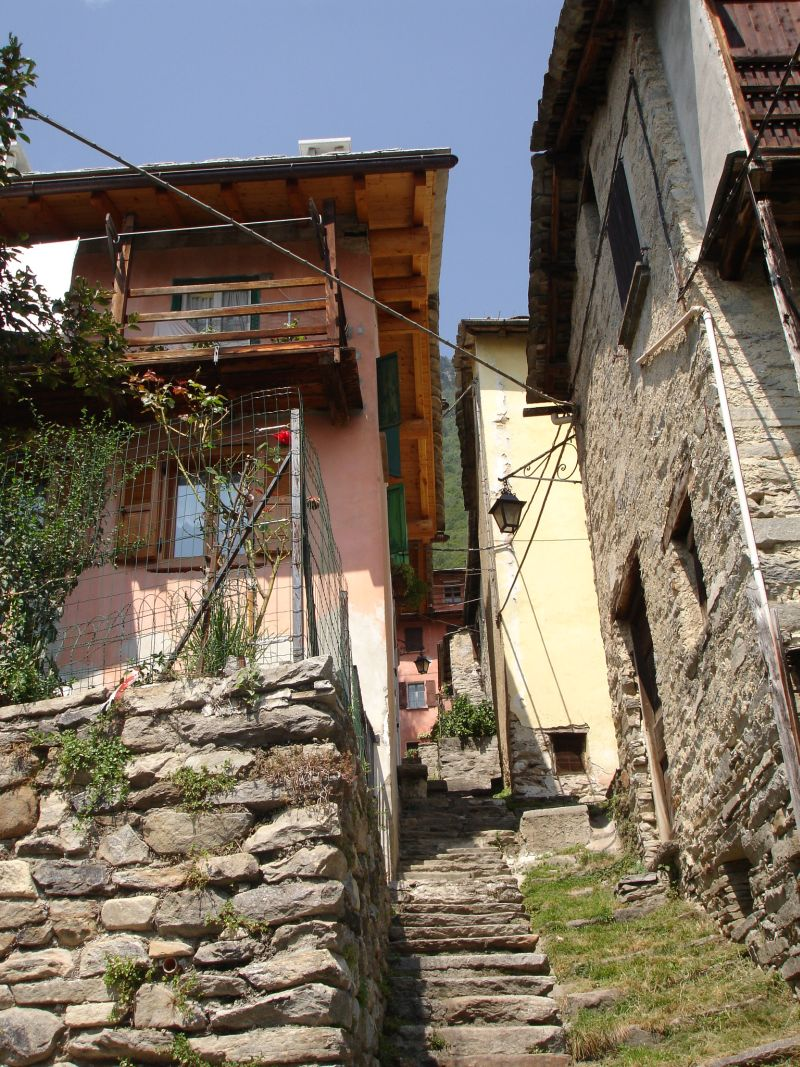 Vicolo a Pianazzola